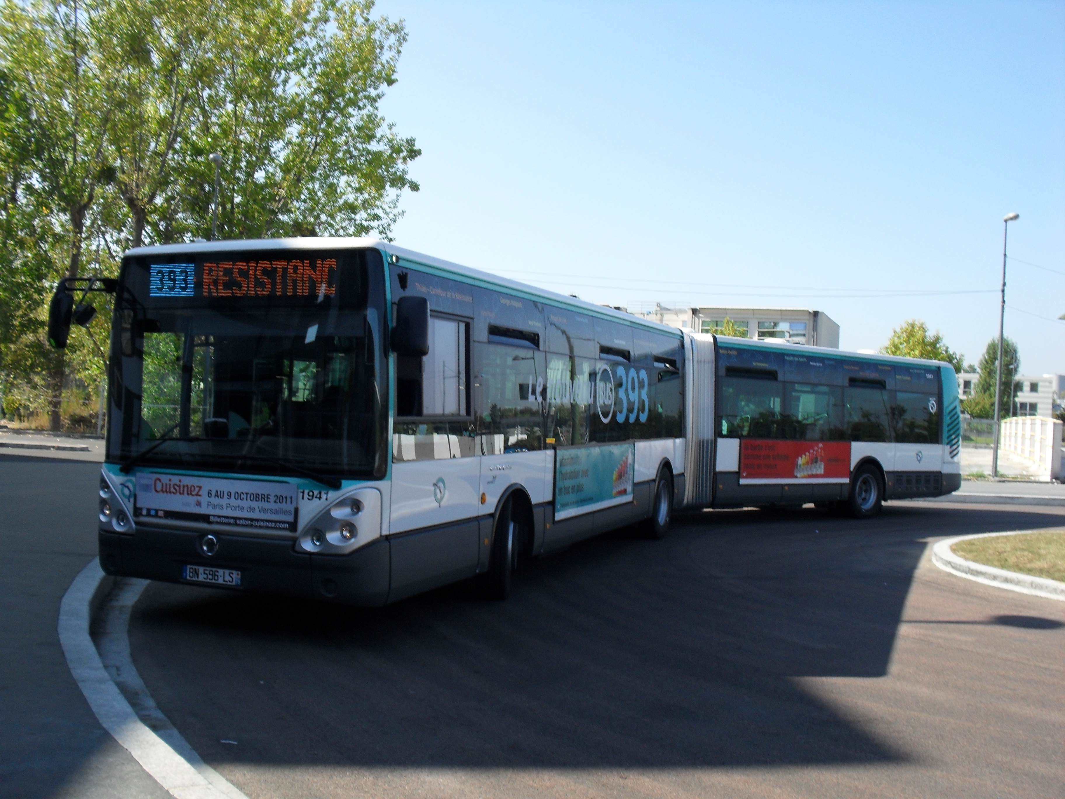 Citelis 18 du TCSP 393 au terminus "Sucy-Bonneuil"